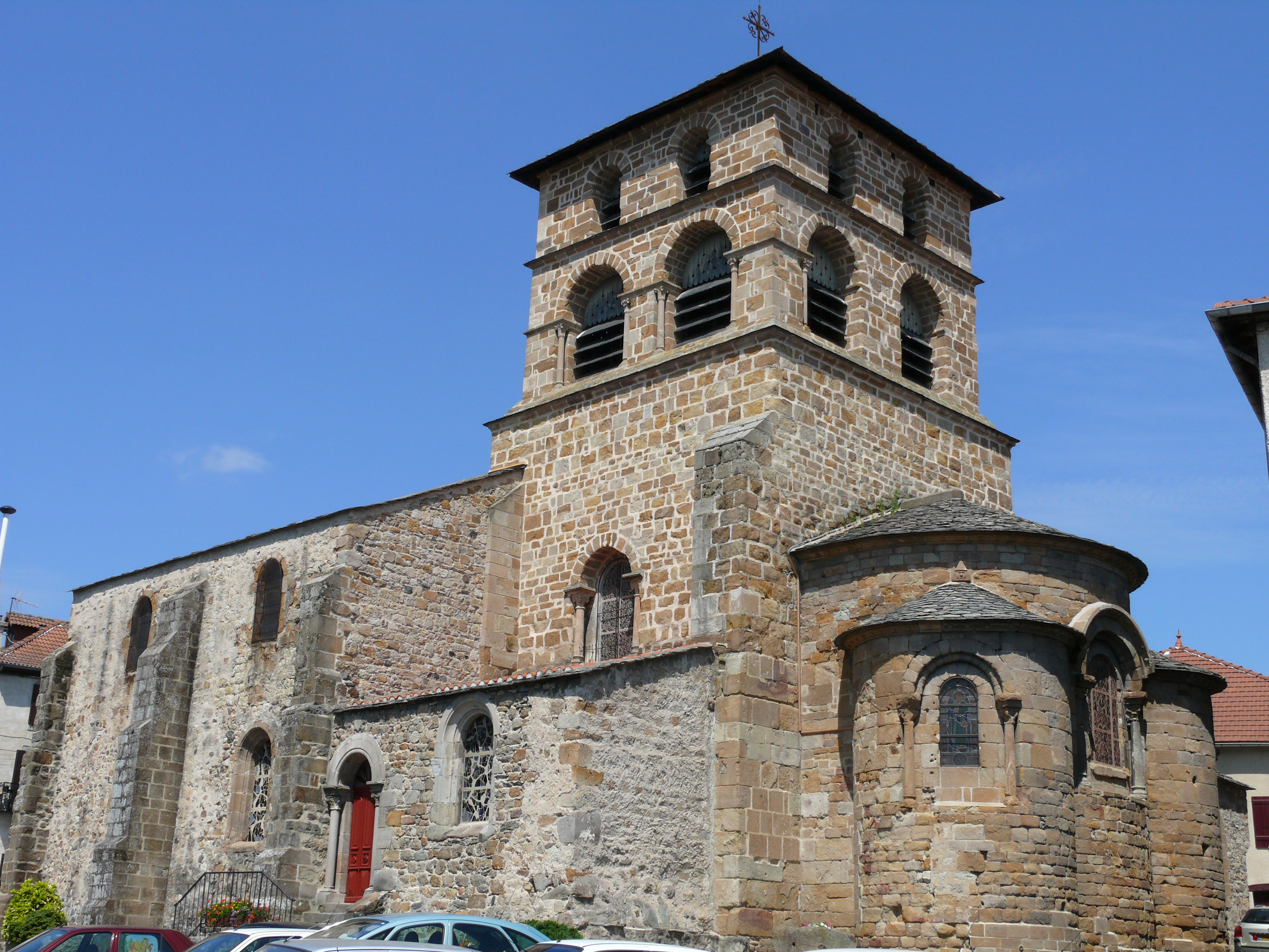 Retournac - Église Saint-Jean-Baptiste